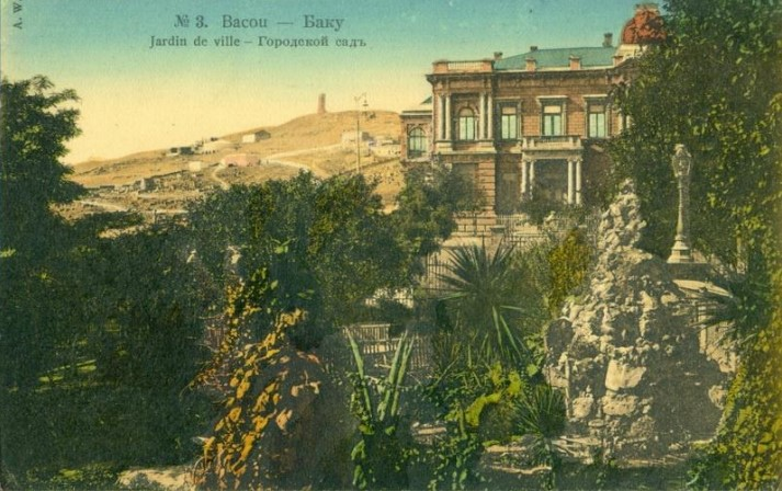 Губернаторский сад. Уголок в районе грота